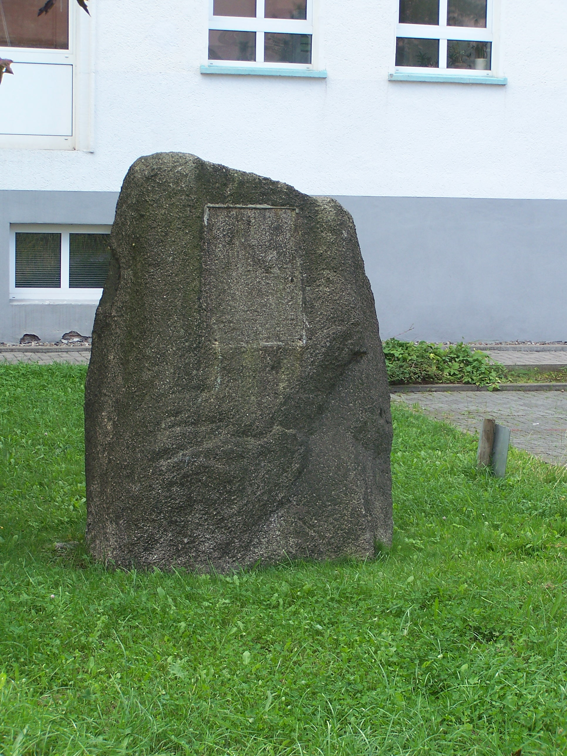 Dieser Gedenkstein befindet sich auf der Nordseite des Grundstücks Rennbahn 4 - ehemalige AWE-Poliklink und ist von der Willi-Enders-Straße aus zu erreichen (vom AWE-Werkstor ca. 50 m entfernt). Der Stein erinnert an Franz Stenzer (1900-1933) einen im KZ-Dachau ermordeten bayerischen Reichstagsabgeordneten der KPD. Der Text der abmontierten Tafel ist überliefert und lautet: FÜR HÖHERES ALS DAS EIGENE SEIN ZU KÄMPFEN UND ZU LEIDEN, OPFER ZU BRINGEN UND MUT ZU ENTWICKELN, DAS GIBT LEBENSKRAFT, GIBT DEM LEBEN ERST EINEN SINN UND MACHT DAS LEBEN LEBENSWERT. (Franz Stenzer, Dachau am 26.06.1933)